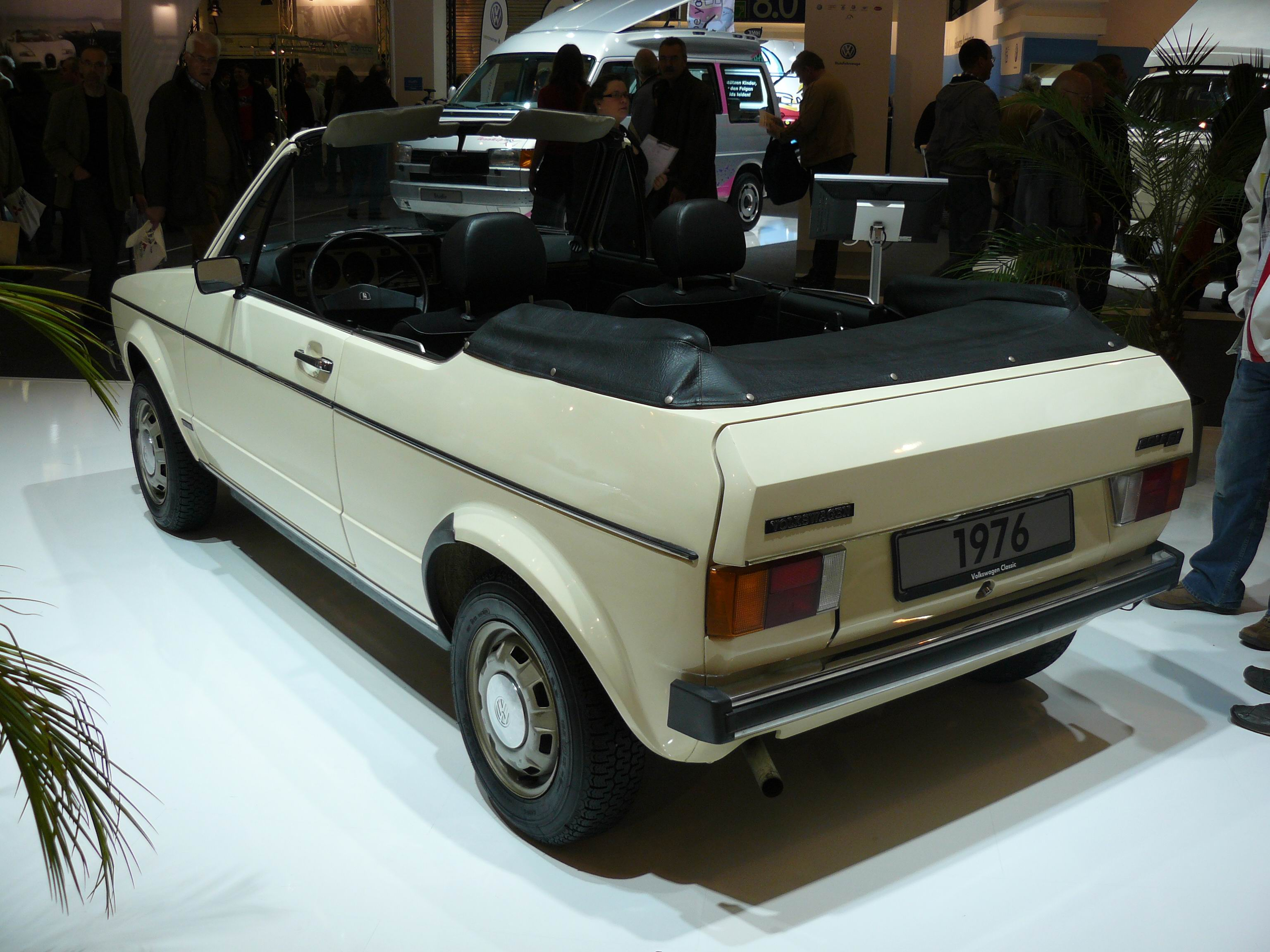 Essen 2011